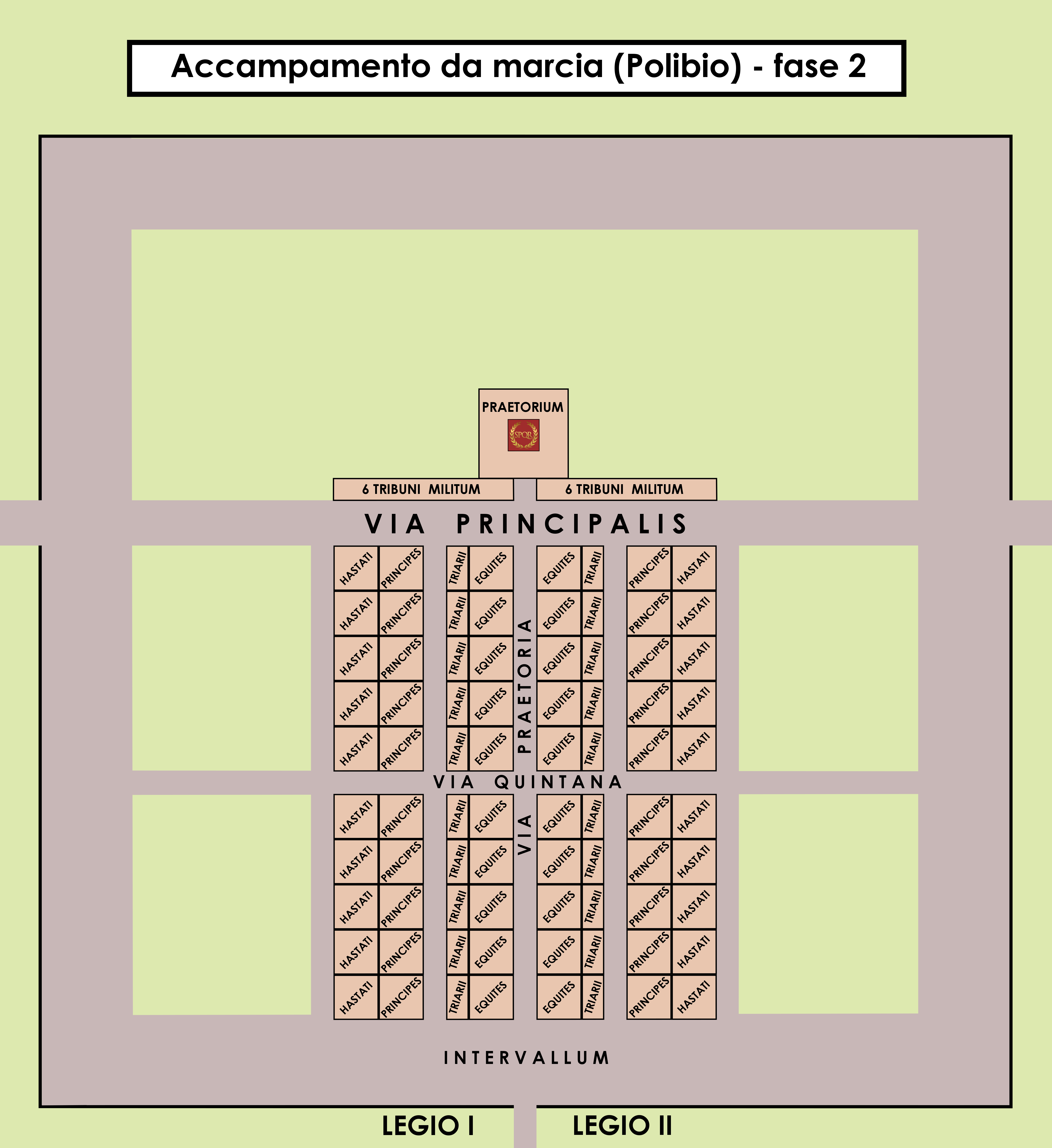 L'accampamento militare romano da marcia secondo Polibio: la seconda fase prevede la disposizione delle tende delle due legioni